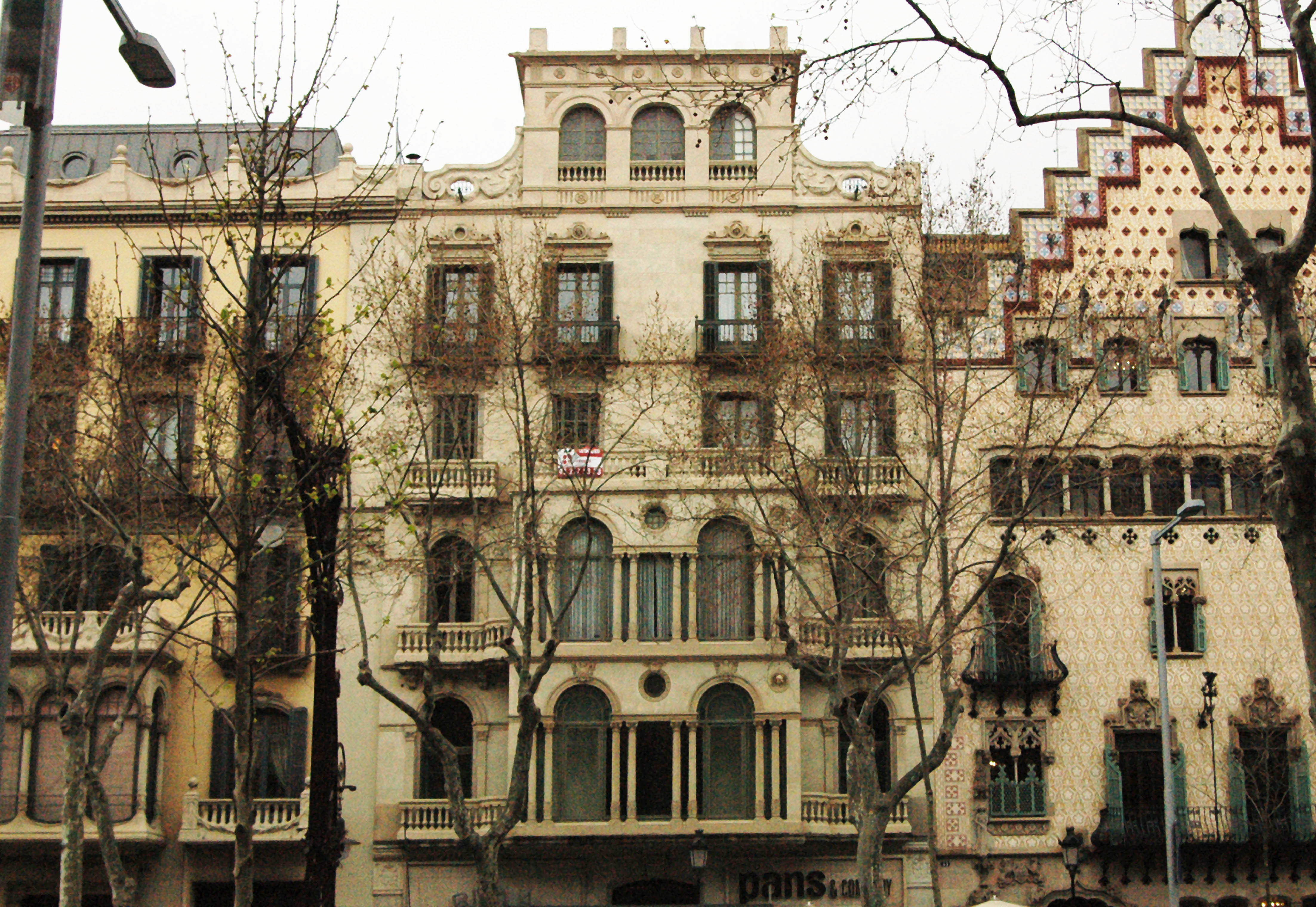 1896-Passeig de Gràcia 97 (avui Passeig de Gràcia 39). Torruella Lladós (Antoni), propietari. 1901-Passeig de Gràcia 39. Torruella Lladós (Santiago), propietari, principal 1ª. 1905-Passeig de Gràcia 39. Soler Farnés (Salvador), metge, 2º pis. Torruella Lladós (Santiago), propietari, principal 1ª. 1908-Passeig de Gràcia 39. Torruella Lladós (Santiago), propietari, principal 1ª. Colonia Casanovas, lleteria. Jordan (Josep), metge dentista. Moreno i Garcia Navarro (Nicolàs), advocat. Picabia i Cª. (P.M.), torradors de cafè Tupinamba. Soler Fornés (Salvador), metge. 1911-Passeig de Gràcia 39. Torruella Callís (Santiago), propietari, principal 1ª. Agent de duanes, consignatari, comisionista i transit. Colonia Casanovas, lleteria. Jordan (Josep), metge dentista. Soler Fornés (Salvador), metge. Tupinamba, torradors de cafè. Valentí germans, joieria. Torruella Pons (Santiago), propietari.